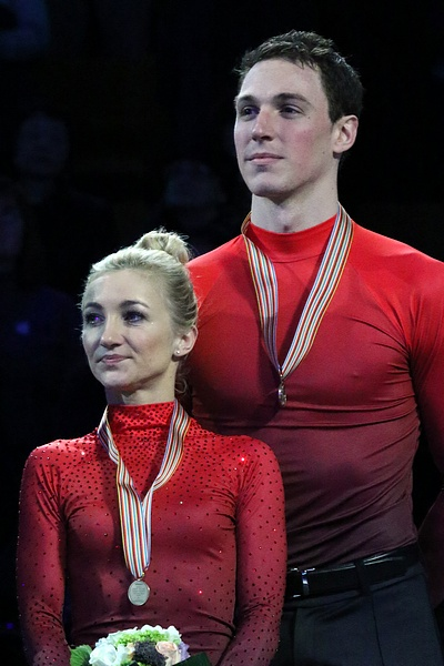 Алена Савченко и Бруно Массо на подиуме чемпионата мира 2016 года